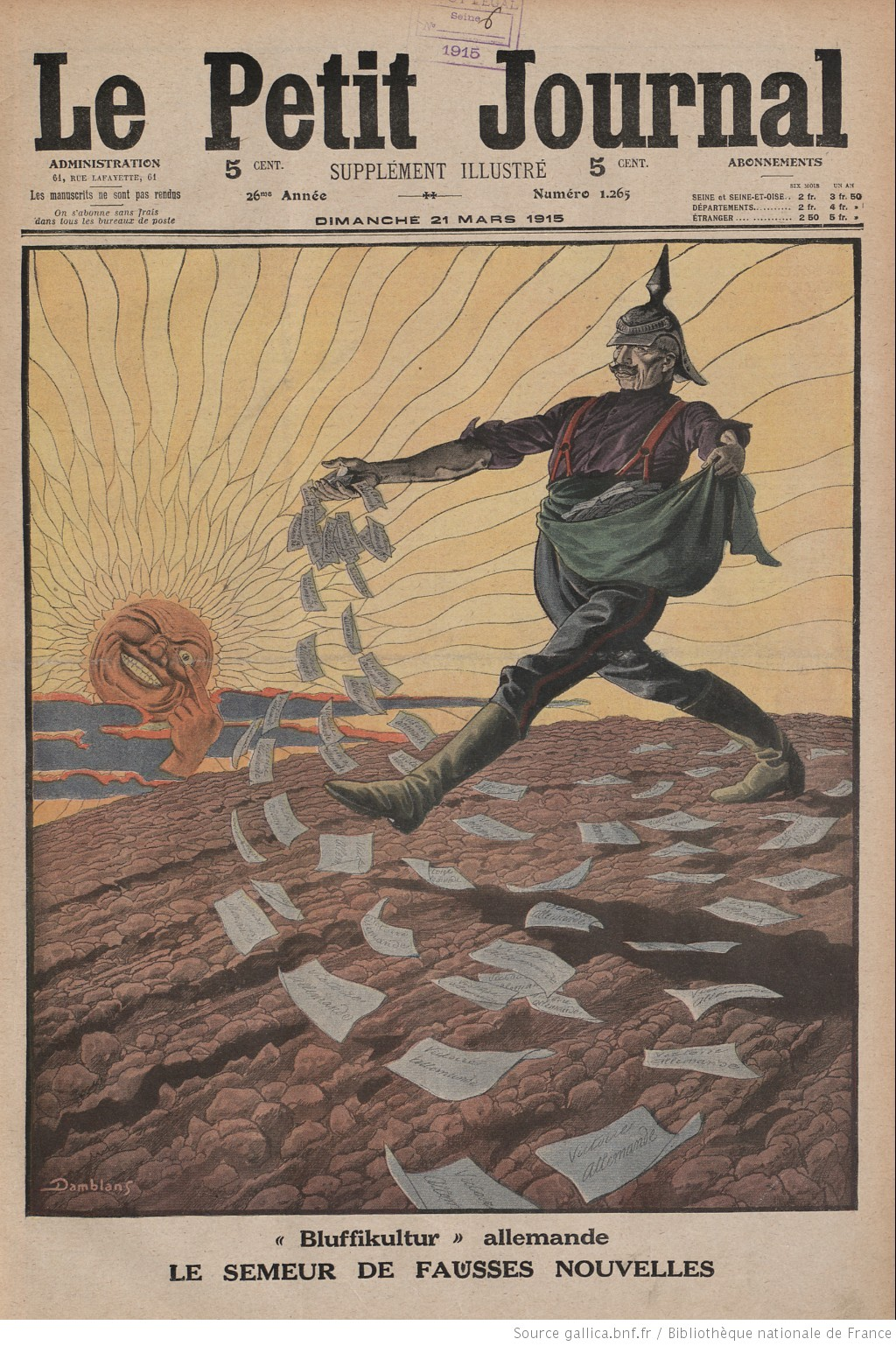 21 3 15 Semeur de fausses nouvelles